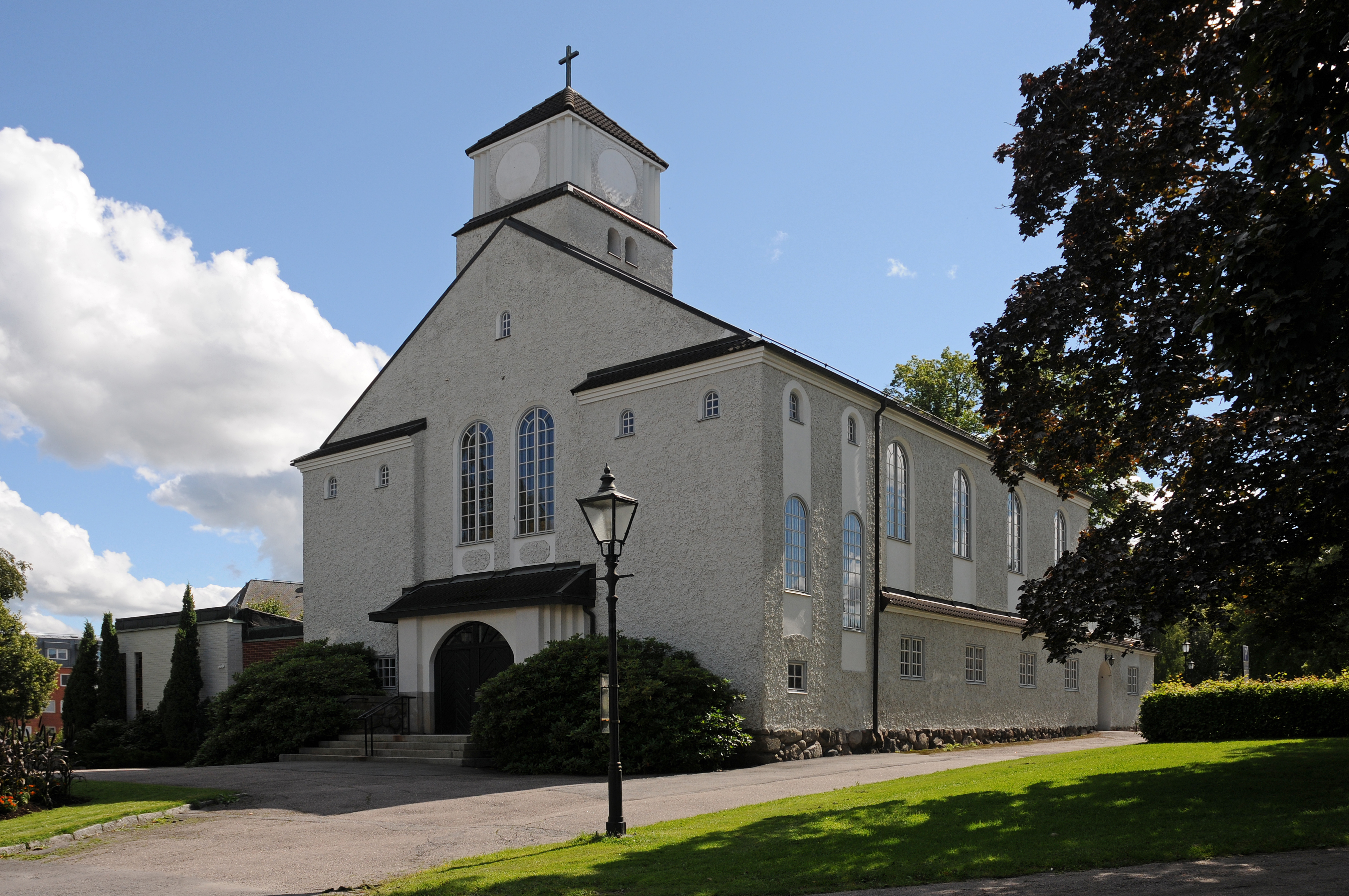 Mariakyrkan i Katrineholm. Byggd 1911. Arkitekter Höög & Morssing